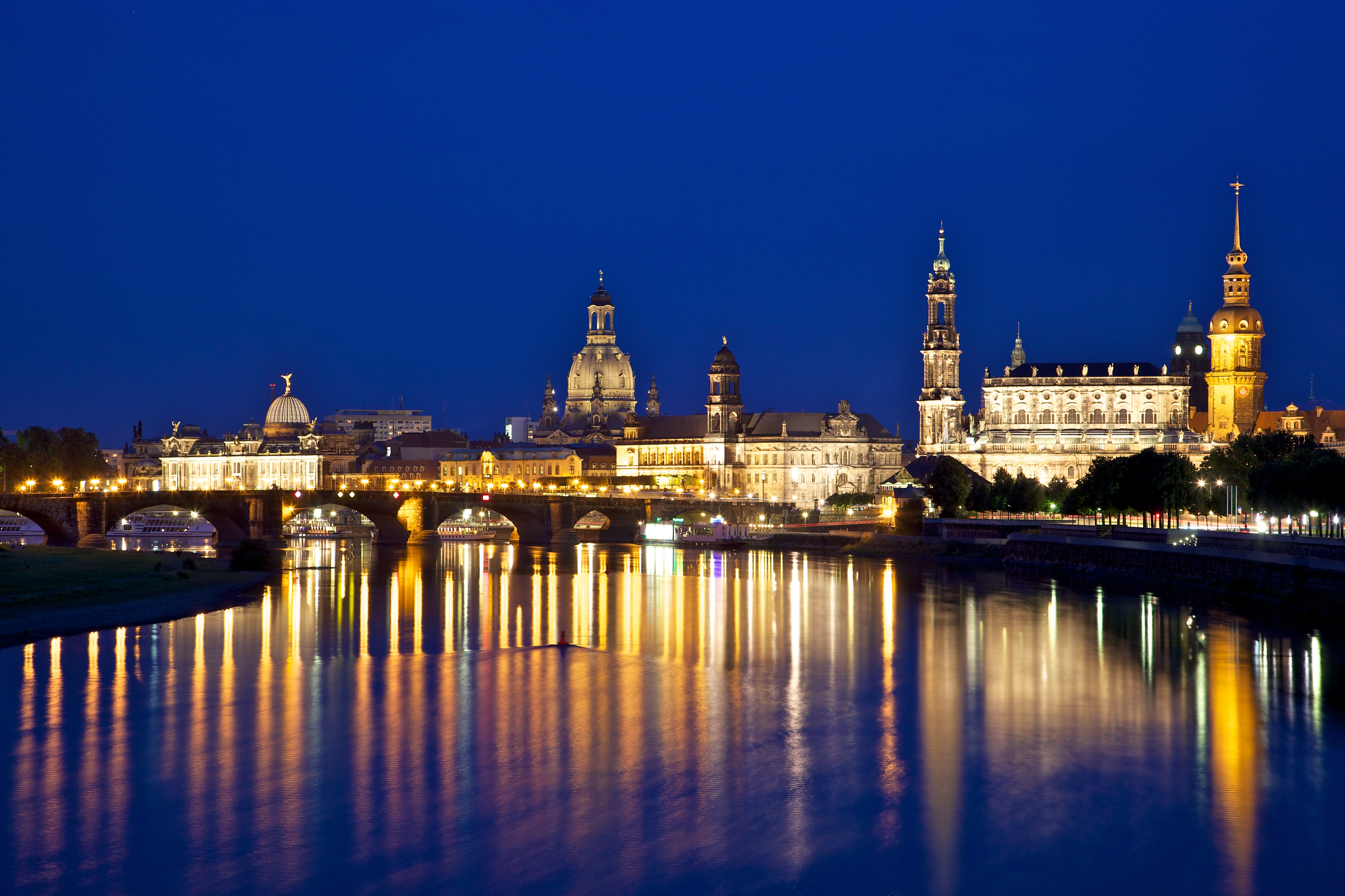 Dresden from Albertbrücke